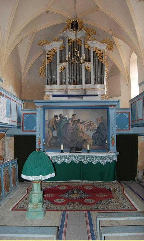 Arthur Coulin - Altarul bisericii fortificate din Bradeni